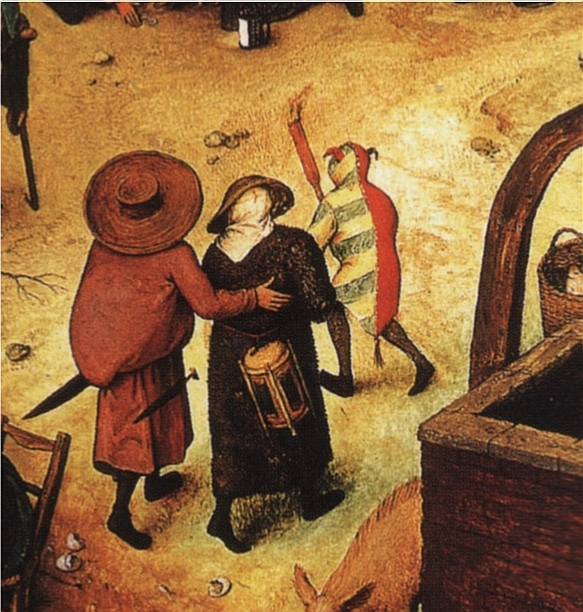 Ausschnitt aus dem Gemälde Der Kampf zwischen Karneval und Fasten (Bildmitte): Zwei Personen folgen einem Narren, der bei Tageslicht mit einer Fackel leuchtet